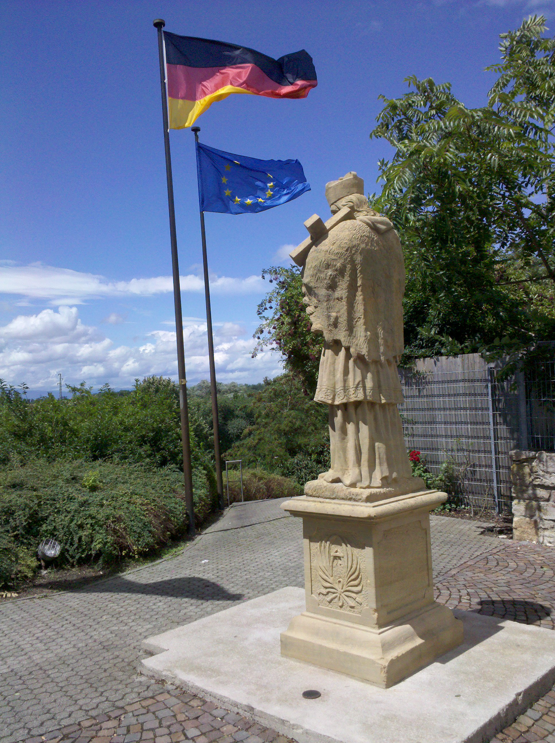 Nepomukstatue und Flaggen in Neuenburg am Rhein